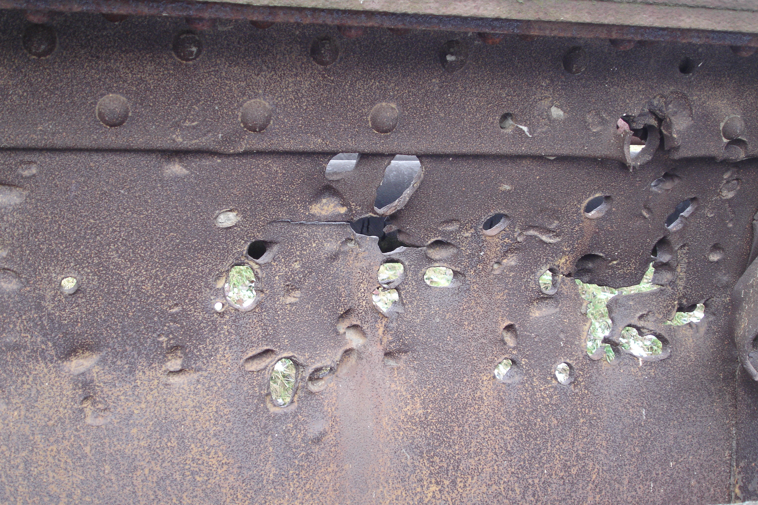 Einschüsse an der VOMAG Panzerbrücke